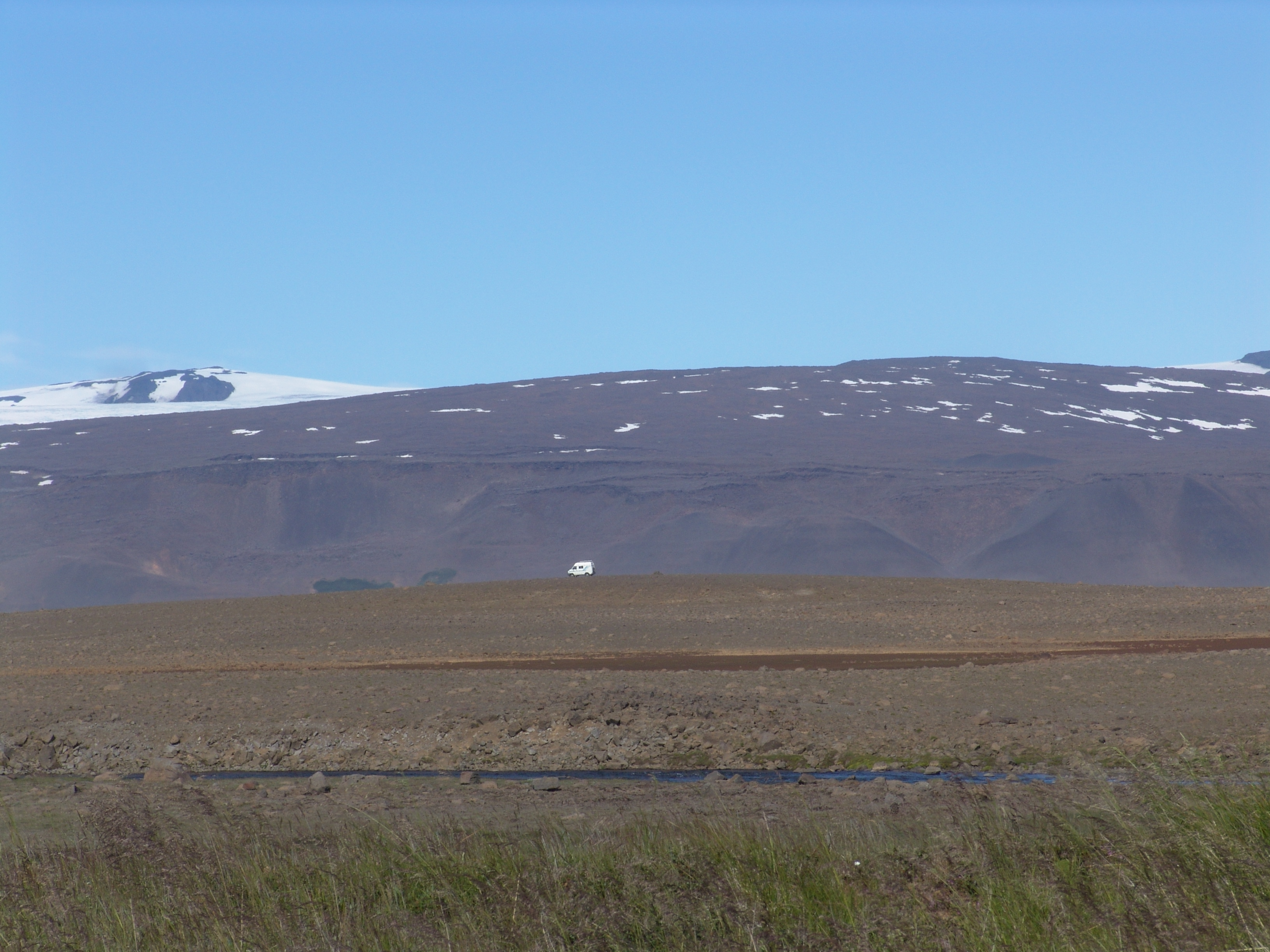 Island, Landschaft.